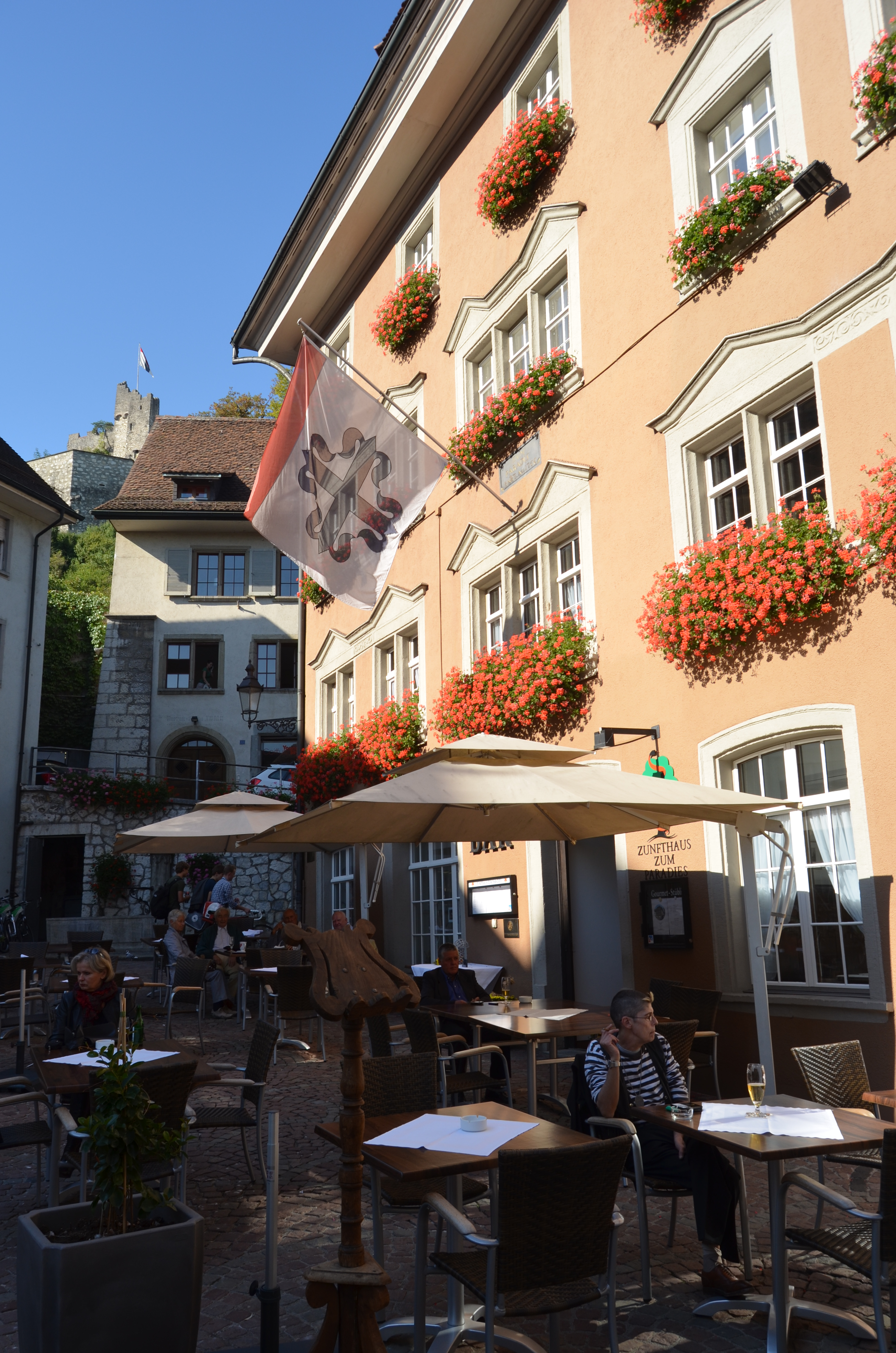 Zunfthaus und Restaurant "Paradies" mit Ruine Stein im Hintergrund. KGS_Nr = 9758 und 44. Cordulaplatz, Baden (AG). 665.454 / 258.316. Kategorie: A, Objektart: Bauten fuer Oeffentlichkeit, Gasthoefe, Pensionen, Herbergen. Koordinaten N 47.47208 E 8.30677. Link zur Geschichte des Hauses